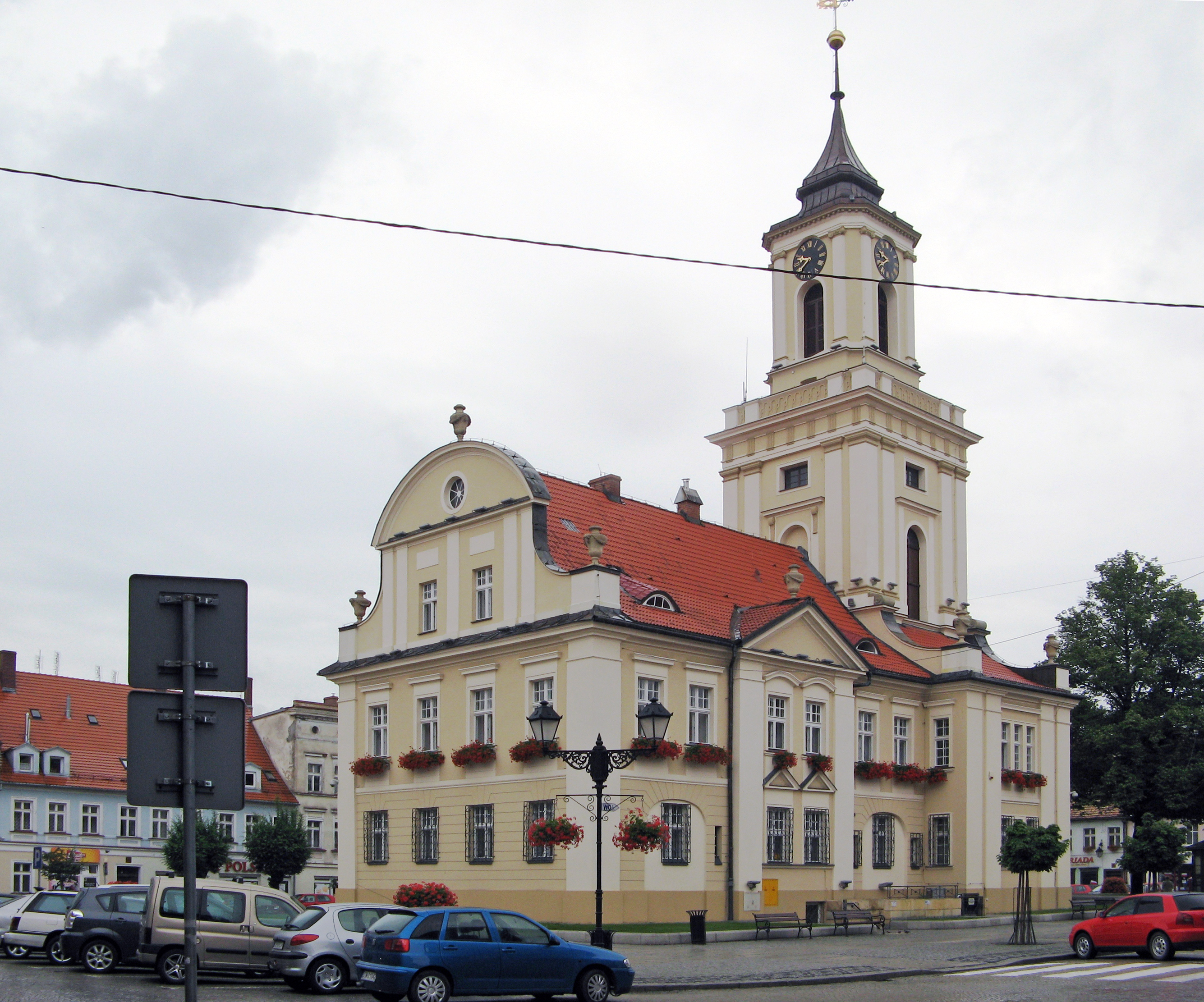 Świebodzice, Rynek 1 - Ratusz (zabytek nr 1688 z dn. 12.05.1966)